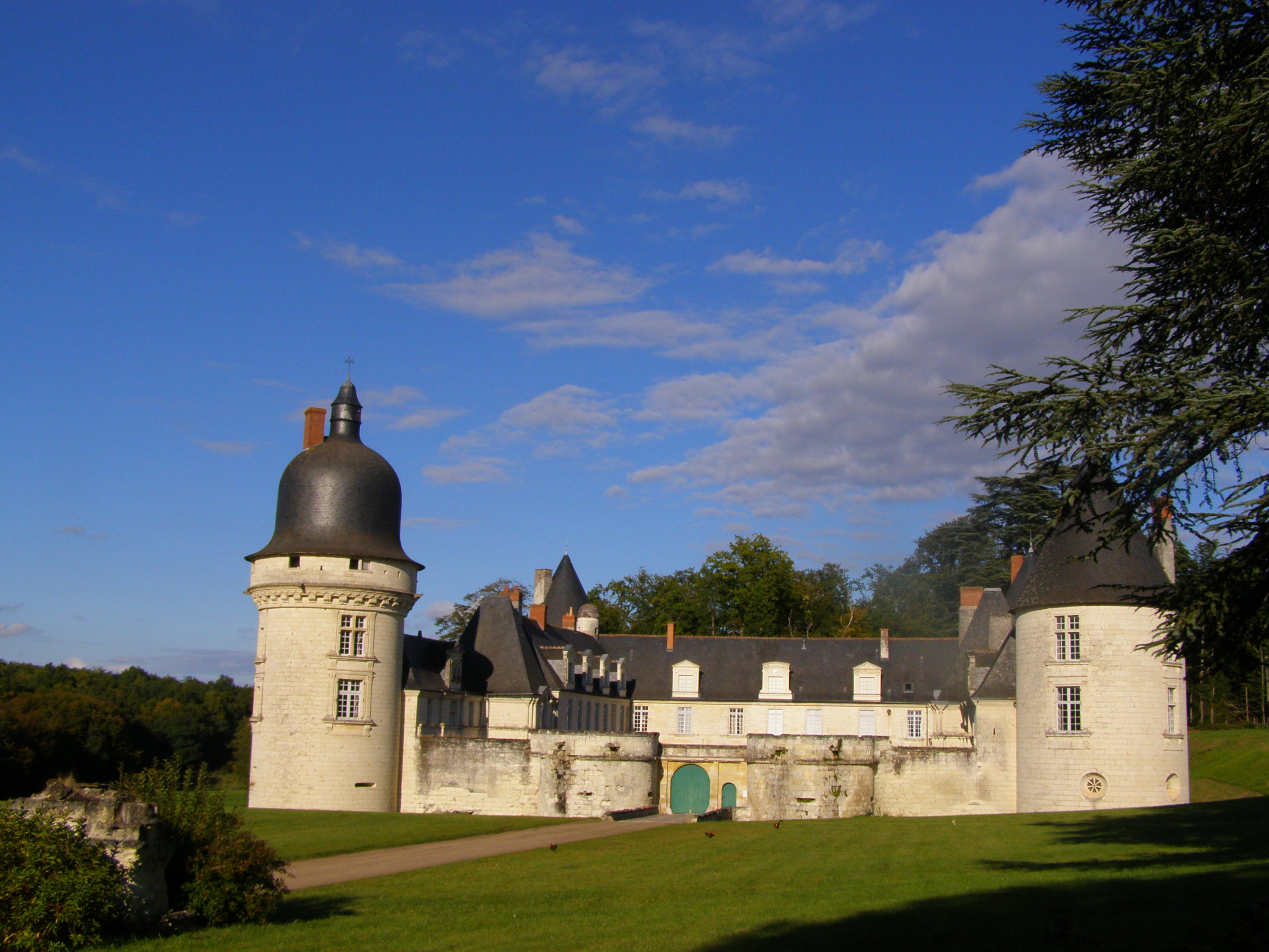 Schloss Le Gué-Péan in Monthou-sur-Cher